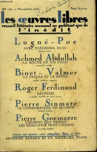 Revue « Les Œuvres libres » n° 137 de novembre 1932 ayant publié des nouvelles de Lugné-Poe.